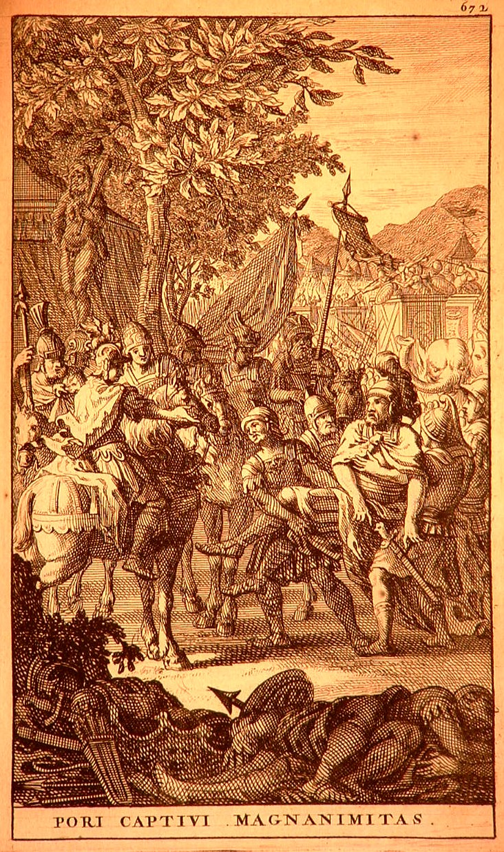 Alexander old drawings